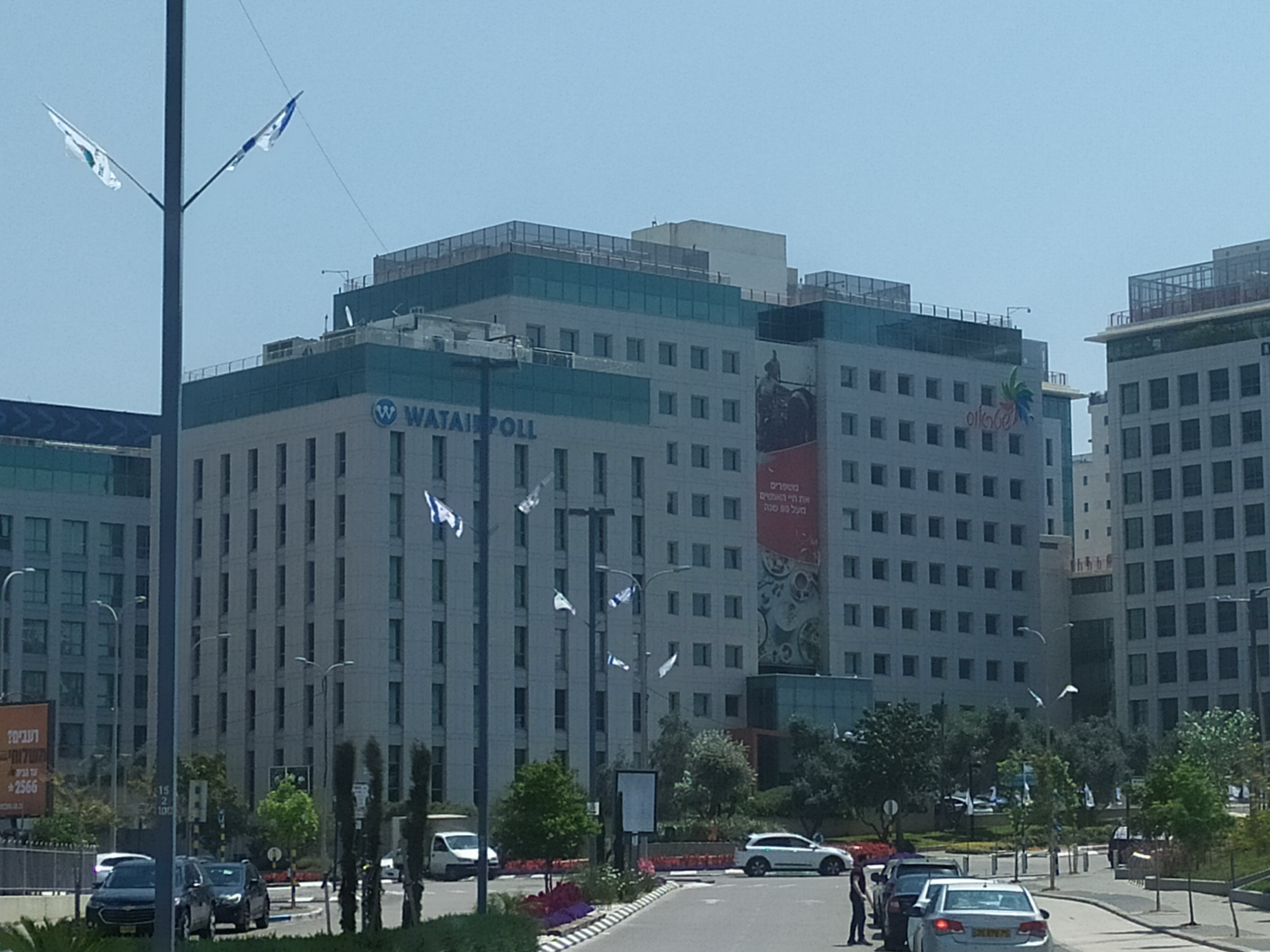 בית שטראוס פתח תקווה